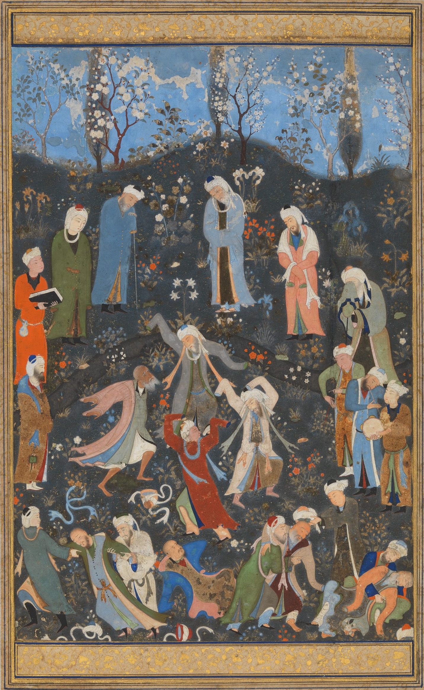 Tanzende Derwische. Illustration aus einem unbekannten Manskript.